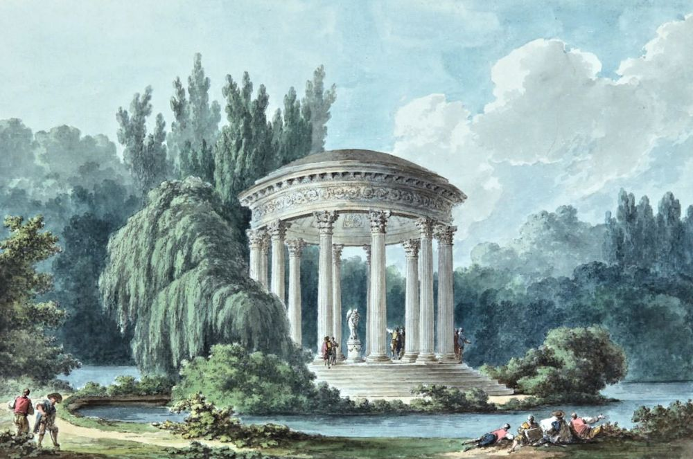 Recueil de la Bibliothèque de Modène